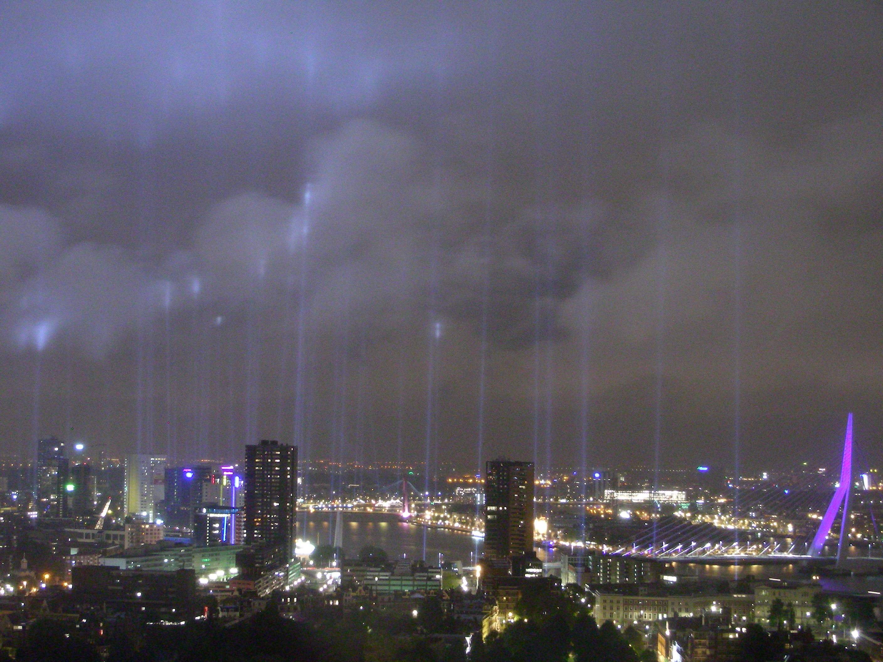 Project Brandgrens in Rotterdam